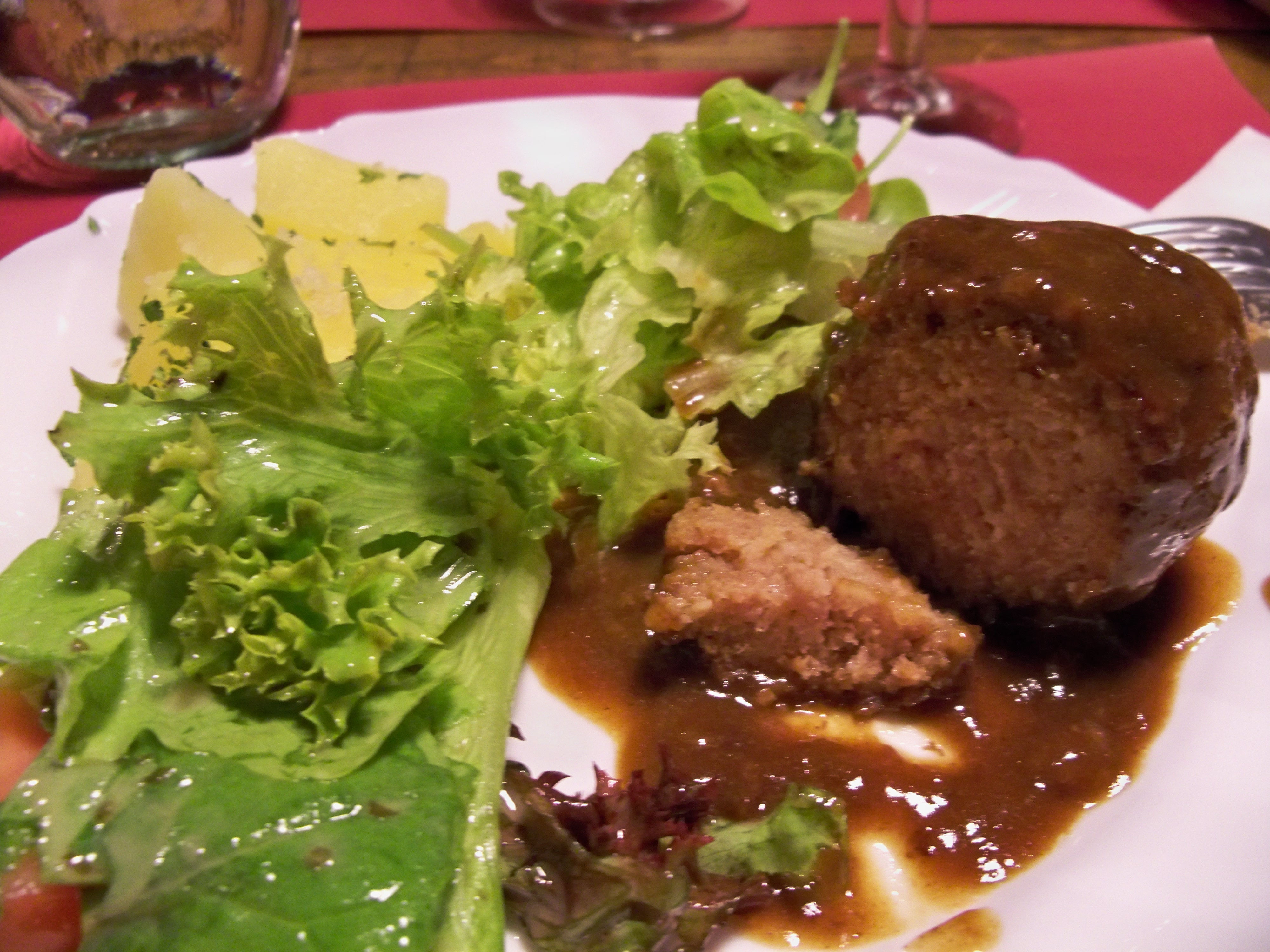 assiette de boulet à la liégeoise